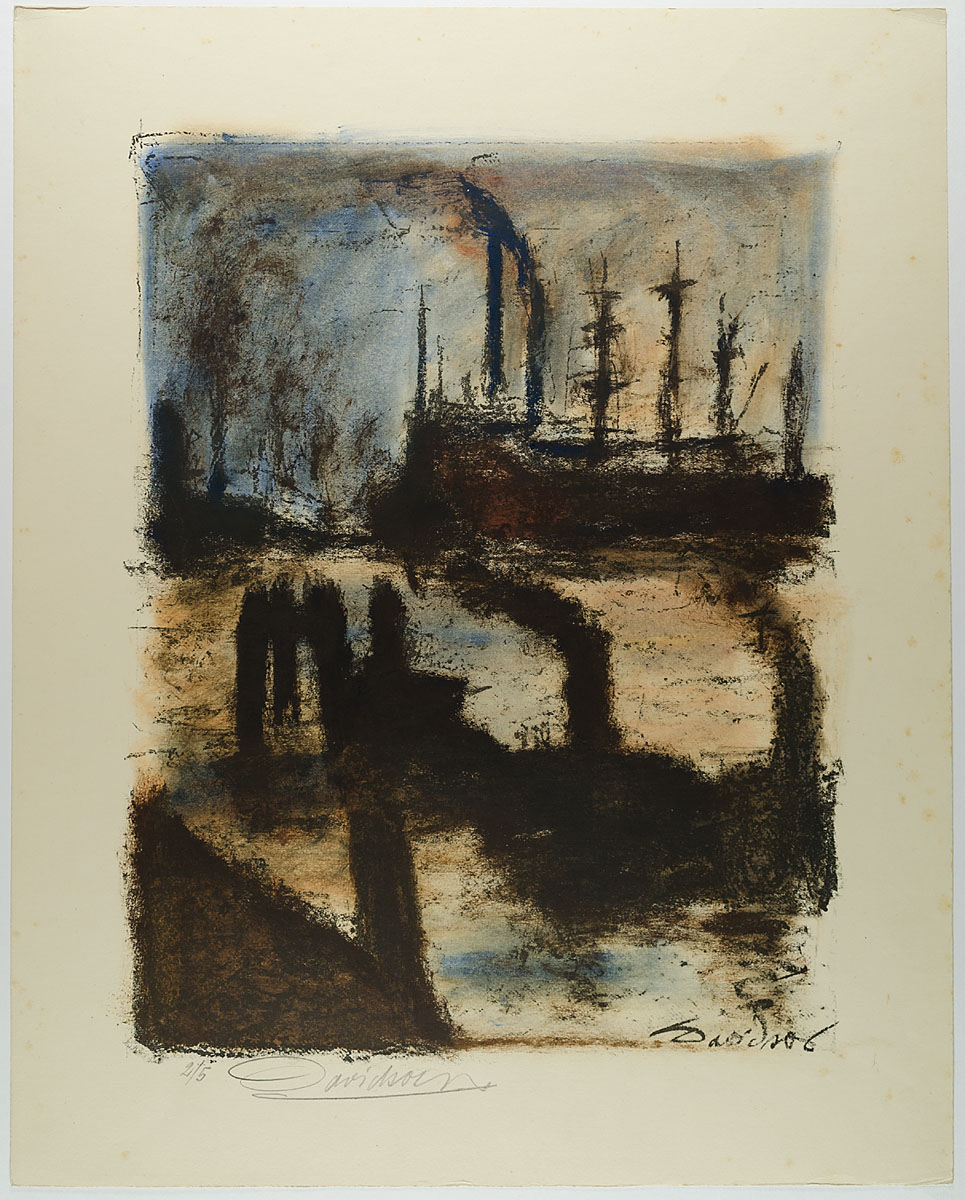 Willy Davidson (1890–1933): Aus dem Mappenwerk "Erde und Eisen", Lithografie, koloriert, Adolf Harms Verlag, Hamburg 1921, Museum für Kunst und Gewerbe Hamburg, Inv.nr. E1970.162.l (Geschenk von W. Tom Hops, Hamburg)